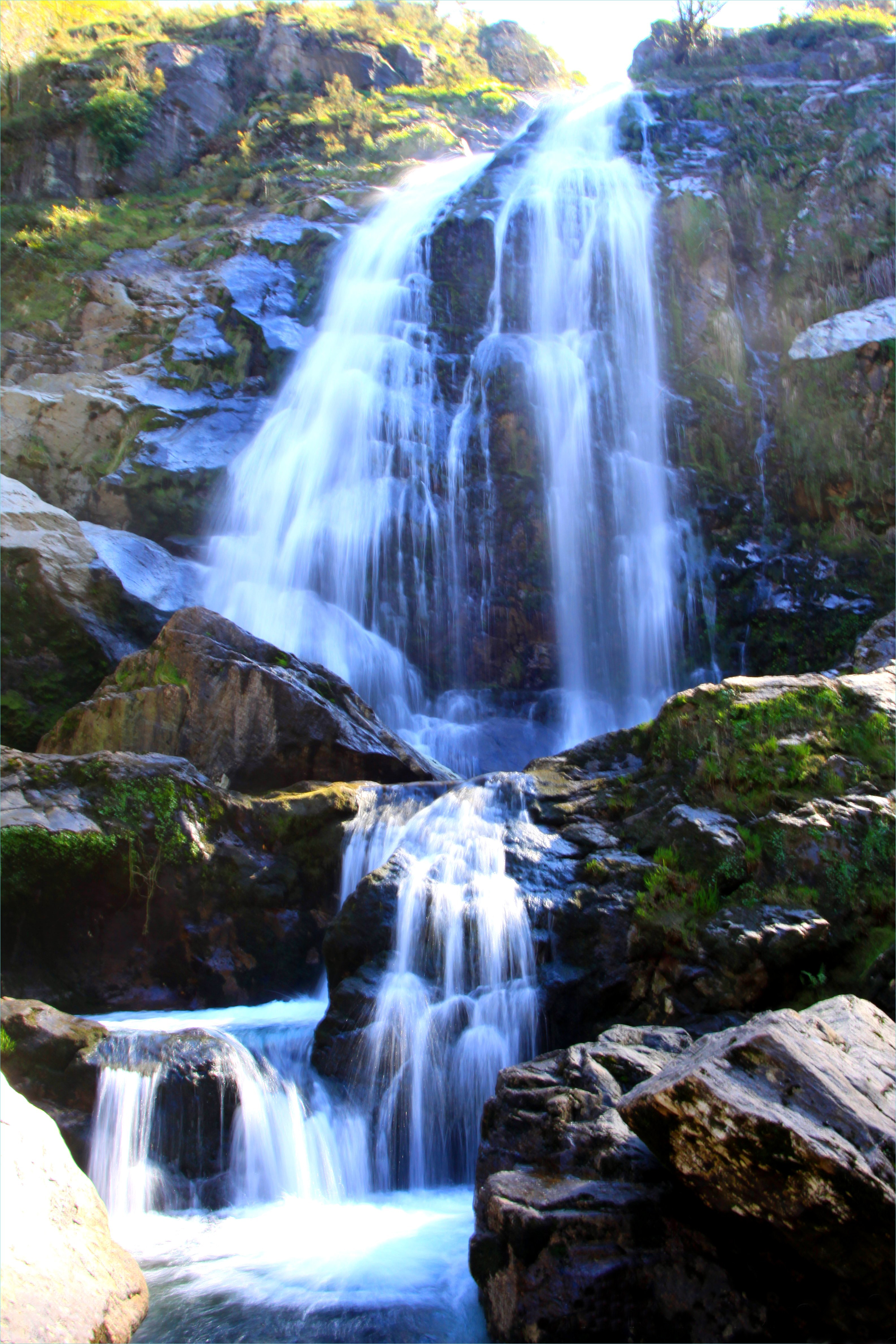 Fervenza no río Belelle, O Roxal, Neda